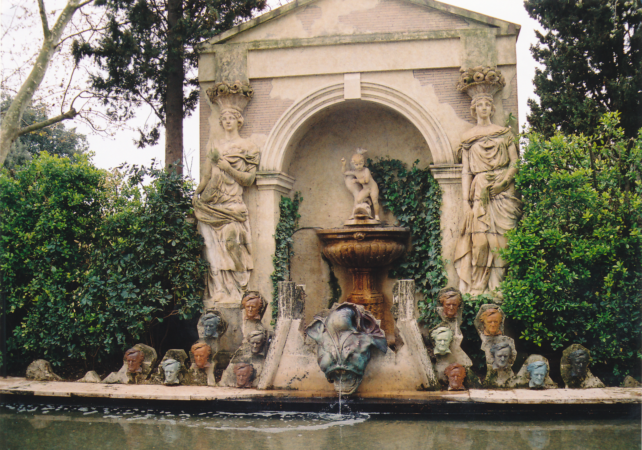 Dali-Brunnen im Castell Pubol mit Wagner-Skulpturen Datum: 04/2008 Urheber: Michael Pfeiffer Quelle: privates Fotoalbum des Urhebers